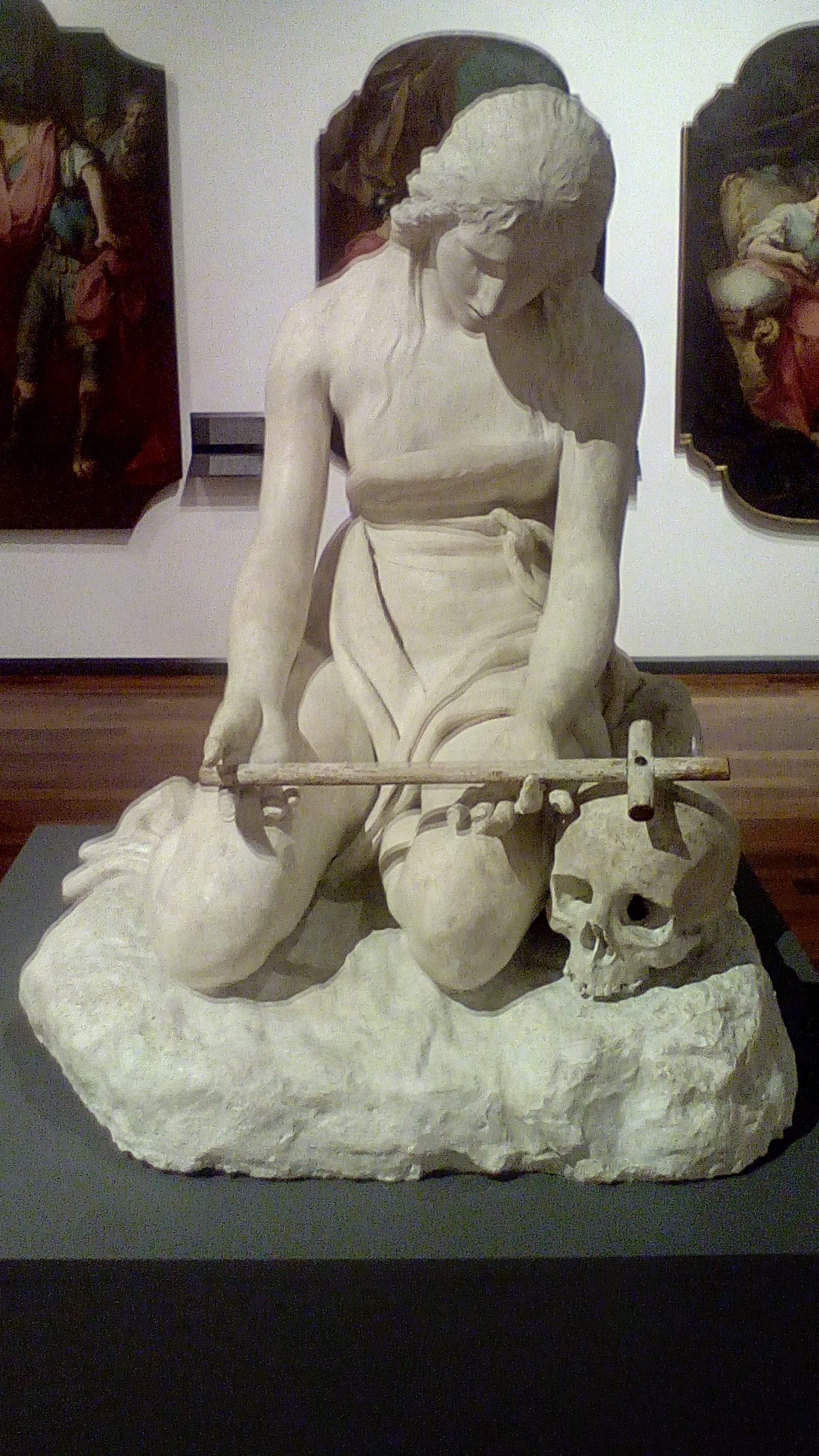 Antonio Canova. Musei civici eremitani, inv 896